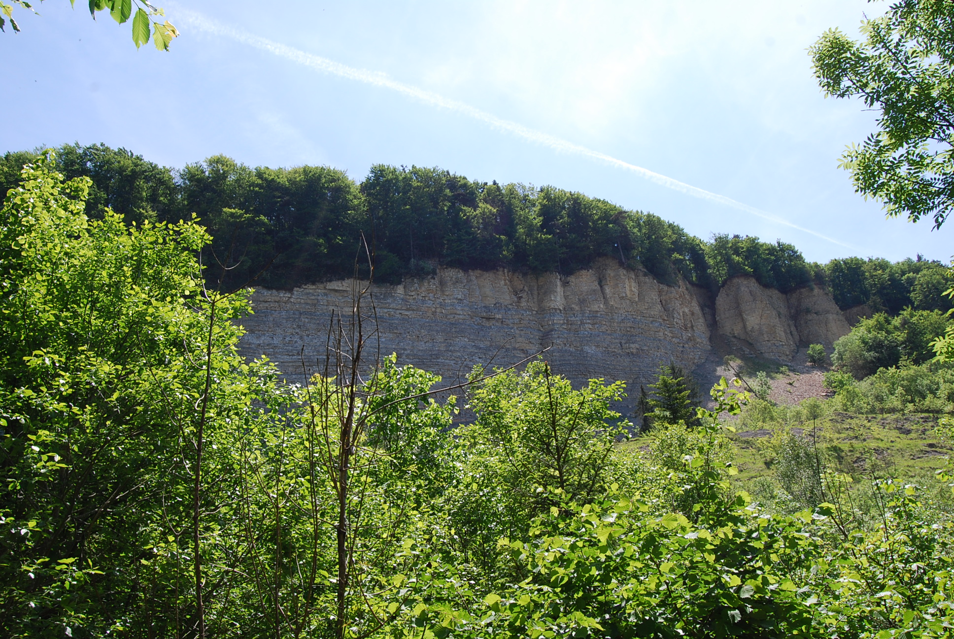 Jungerwald direkt vor dem Steilhang "Bergrutsch am Hirschkopf"